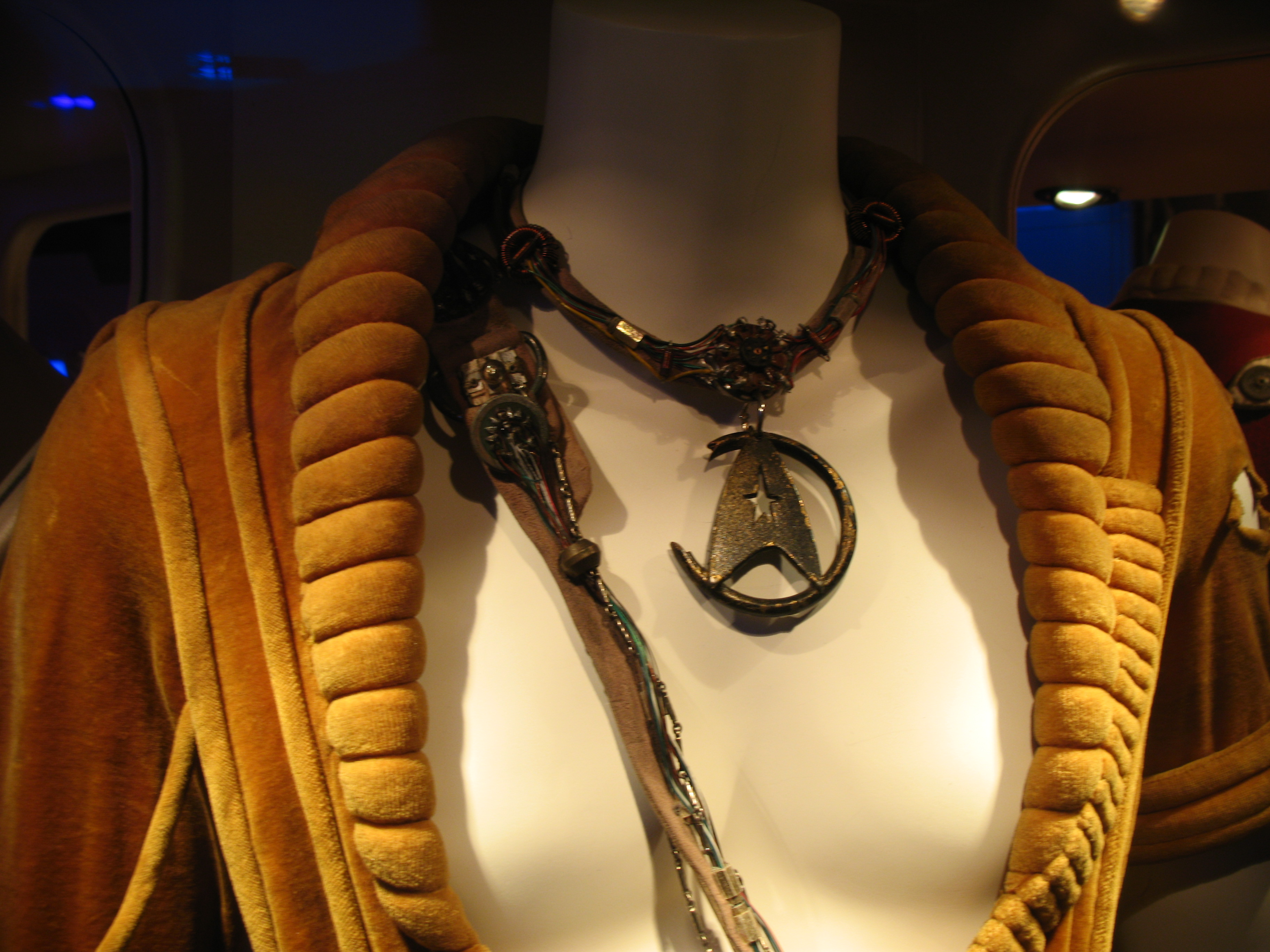 khan's neckalce